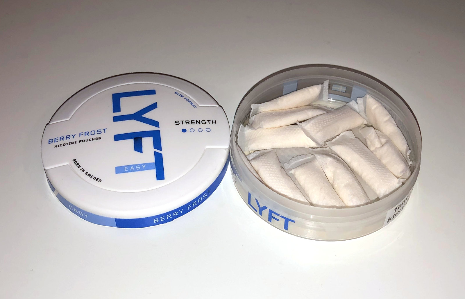 Nikotinové sáčky Lyft s příchutí berry frost.